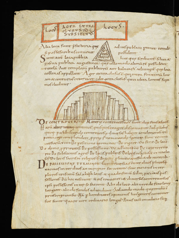 Cod. Eins. 358, Beispiel einer geometrischen Darstellung, S. 4